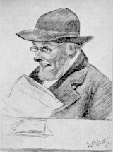 Andreas Blochs portrett av Ivar Aasen, 1886